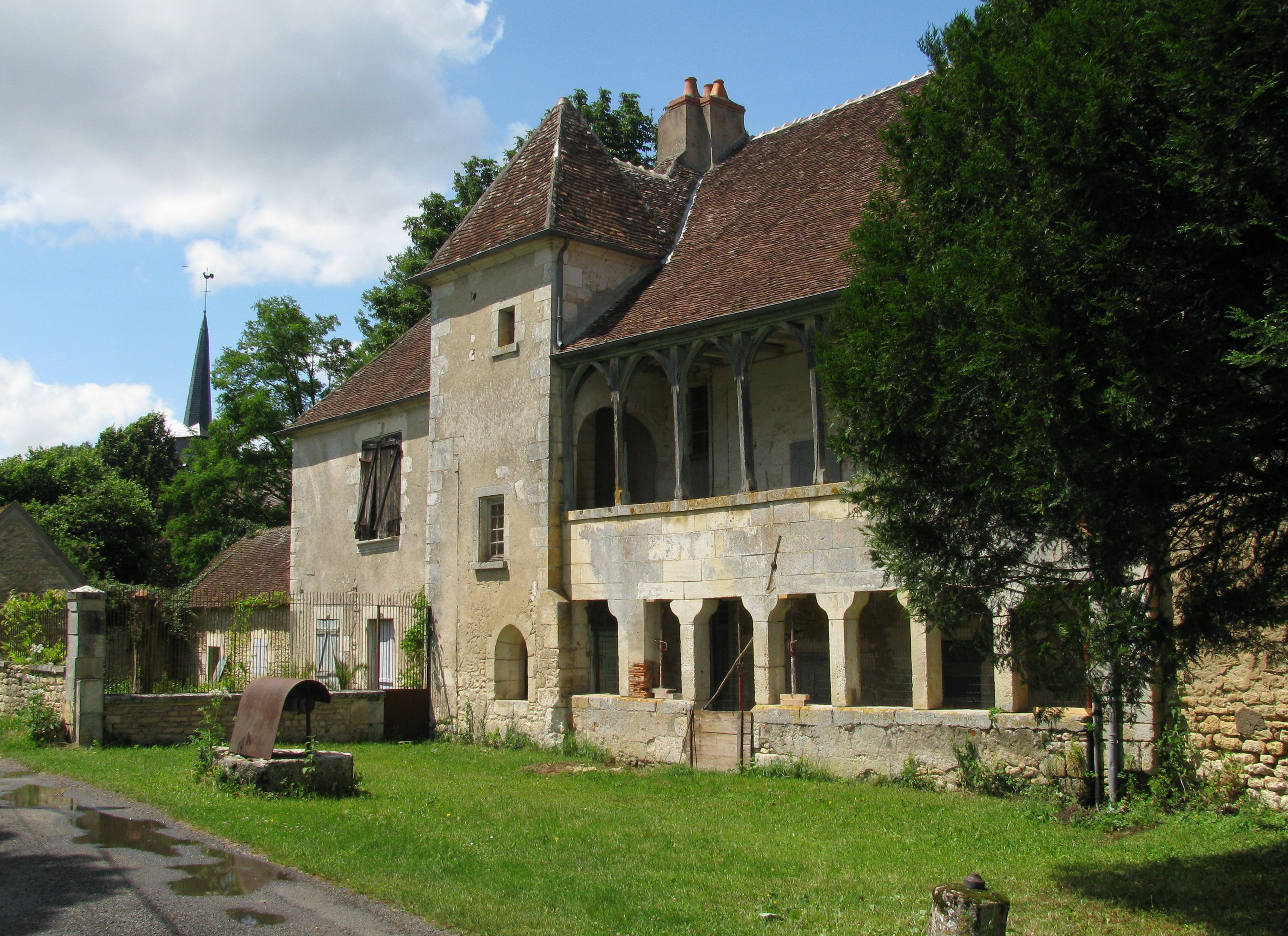 Manoir de Bulcy, Nièvre, France